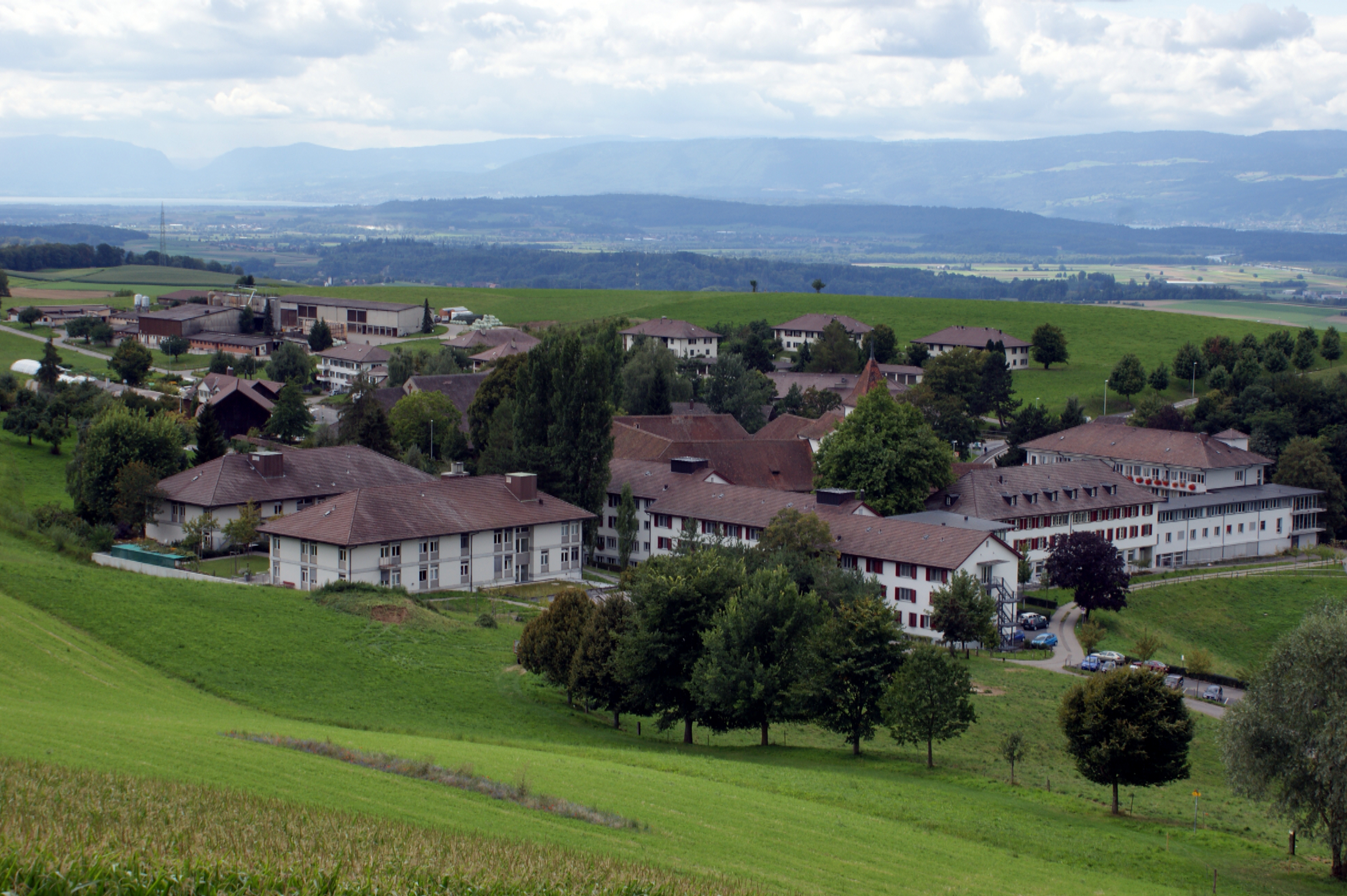 Sicht auf das Wohn- und Pflegeheim Frienisberg mit dazu gehörendem Landwirtschaftsbetrieb